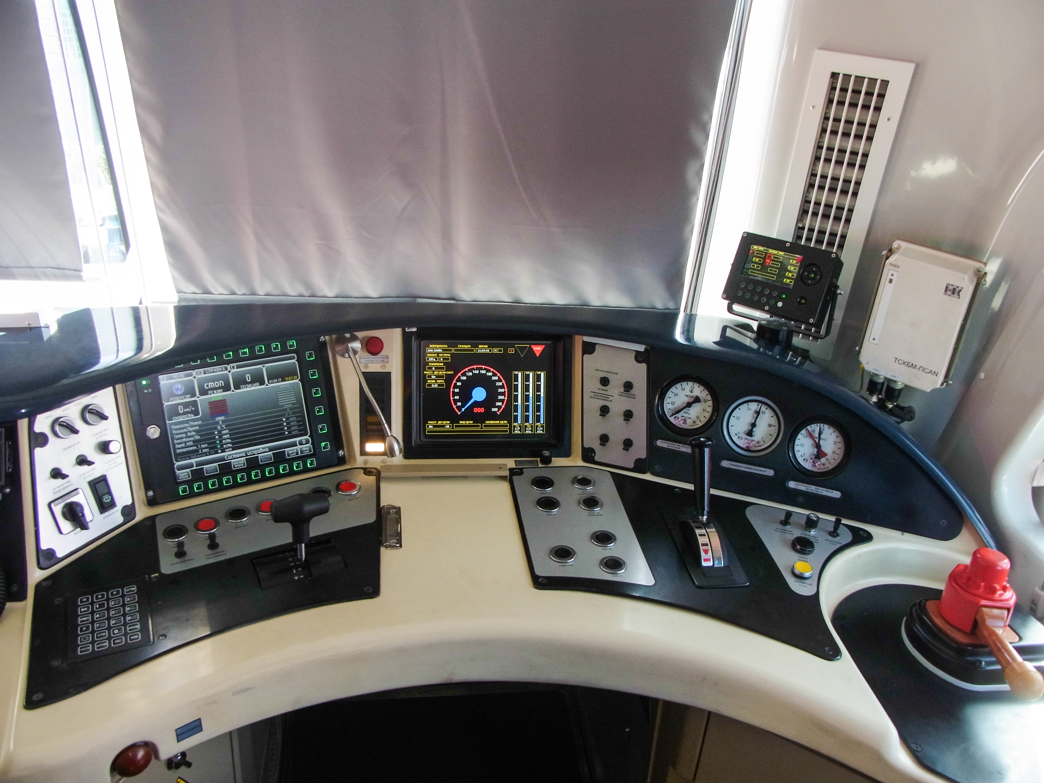 Пульт управления машиниста в кабине тепловоза 3ТЭ25К2М-0001